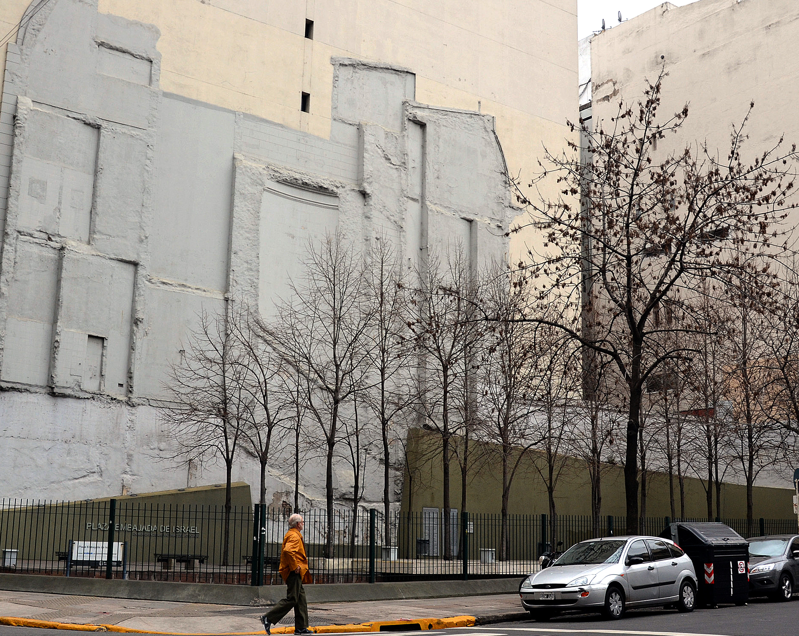 Plaza de la Memoria, también denominada Plaza Embajada de Israel, situada en la esquina de las calles Arroyo y Suipacha, en Buenos Aires. Ocupa el lugar que tuviera esa sede diplomática, destruida por un ataque terrorista con auto-bomba el 17 de marzo de 1992 a las 14:45 hora local, causando 29 muertos y 242 heridos. Aún se puede observar en los restos de mampostería adheridos a la pared medianera, la silueta del edificio destruido.